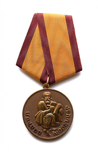 Медаль Мовсеса Хоренаци присуждается за выдающиеся достижения в области культуры, искусства, литературы, образования, обществоведческих наук и спорта.